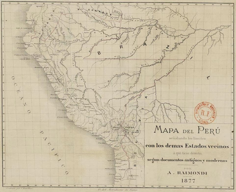 Mapa del Perú de 1877, dibujado por Antonio Raimondi.